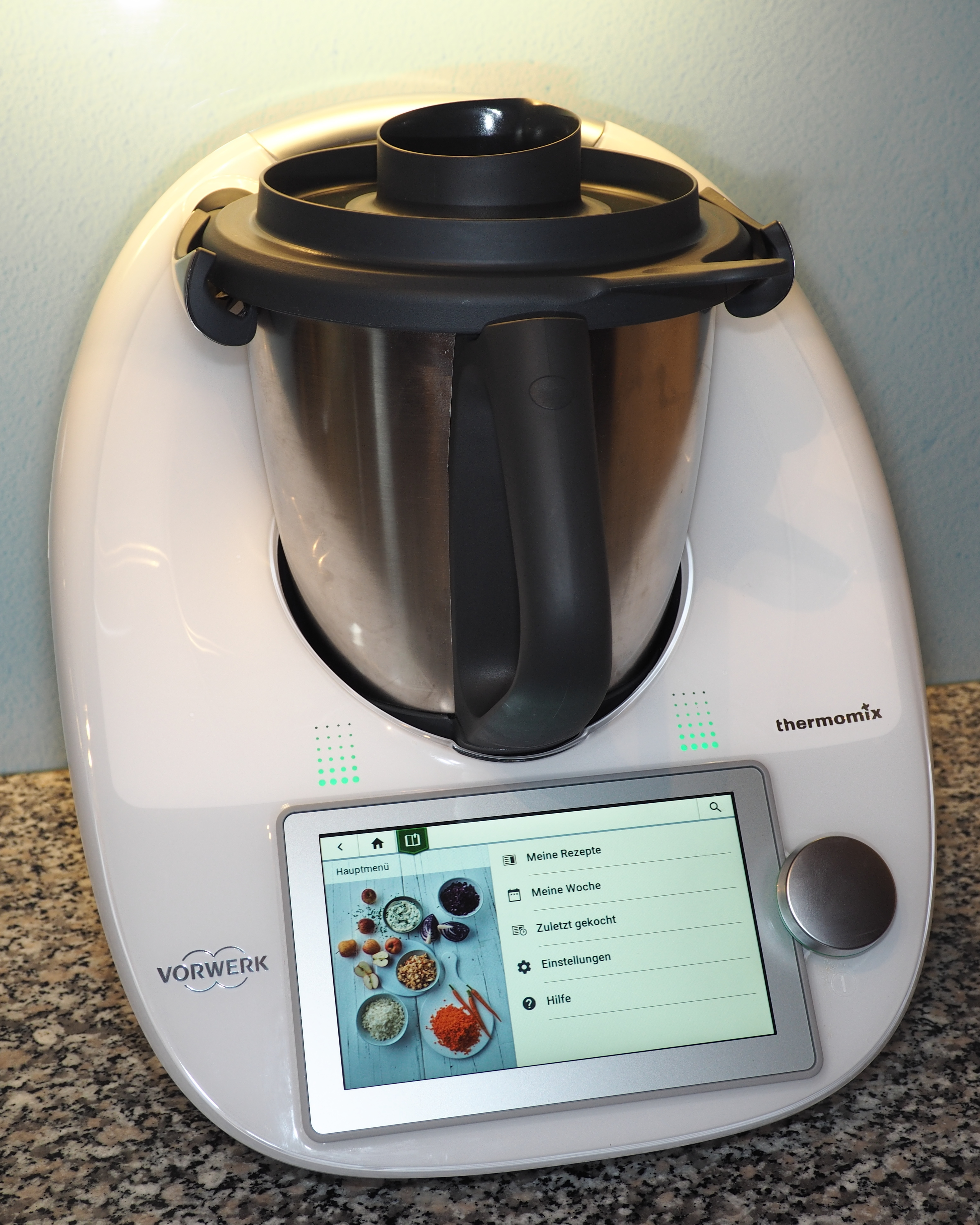 Thermomix TM6 von 2019 mit Wlan-Verbindung und Menüführung durch das Kochrezept